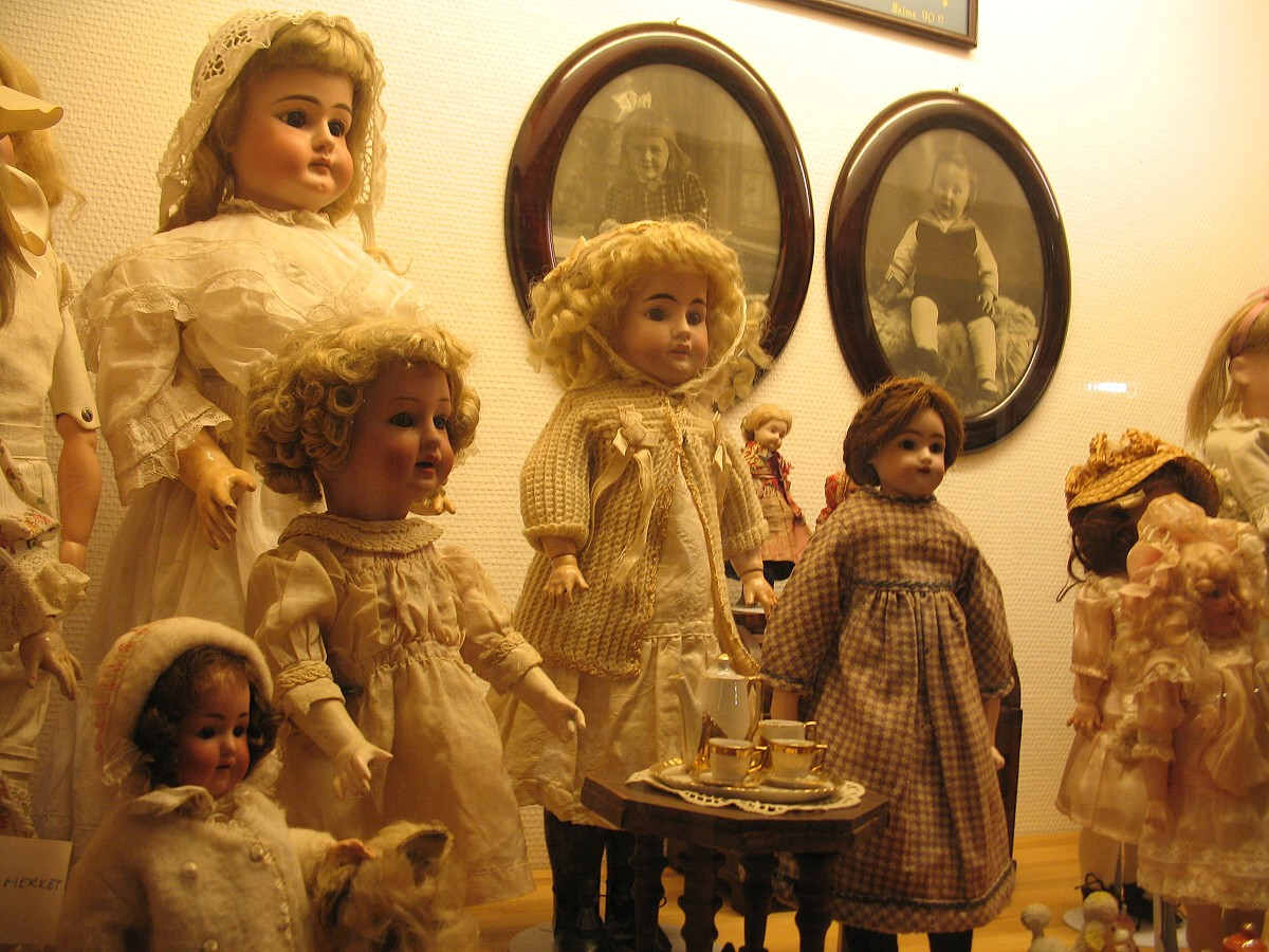 Museum of Toys, Isle of Sakrisøy, Lofoten.